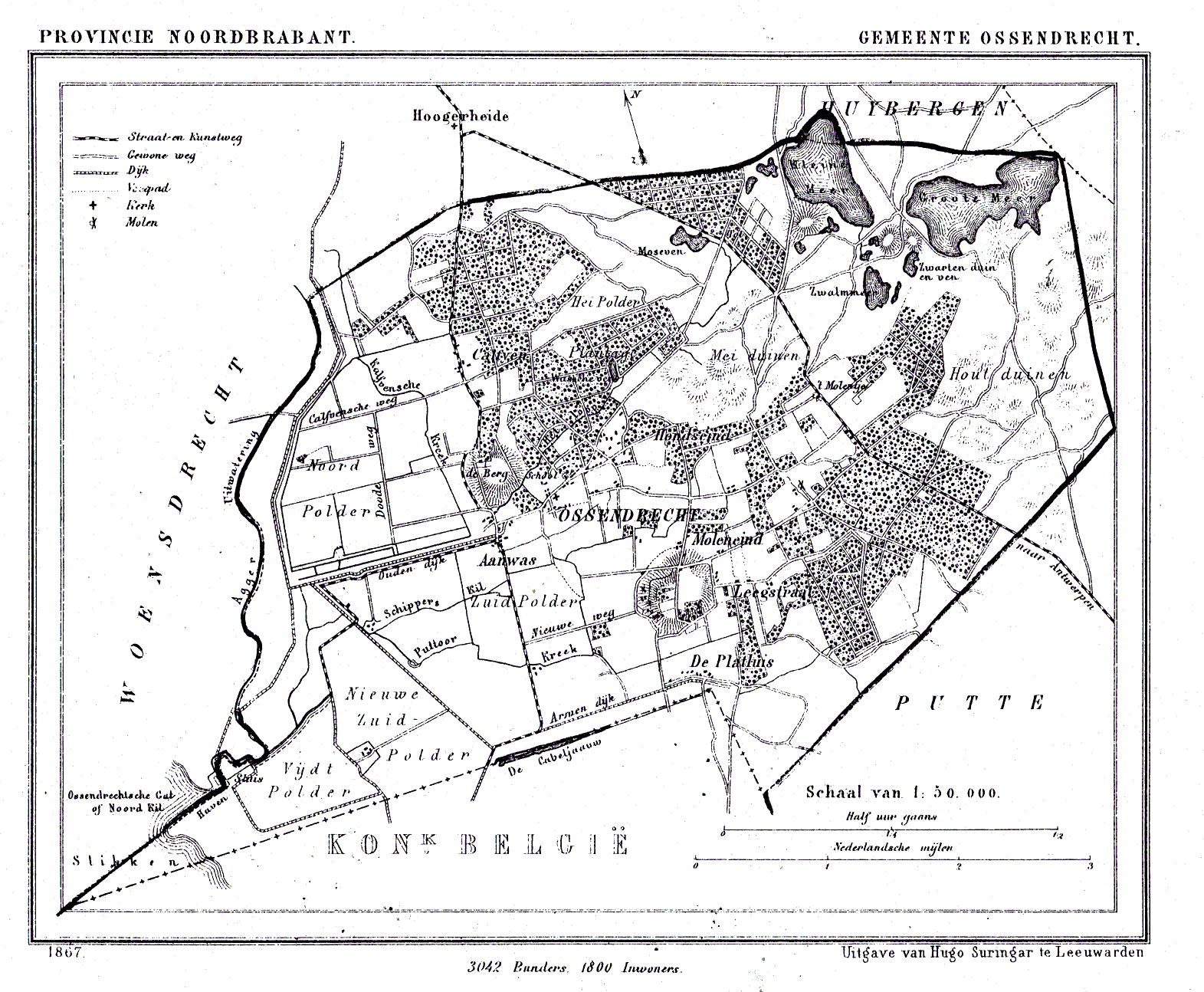 Nederland, Noord-Brabant, Gemeente Ossendrecht